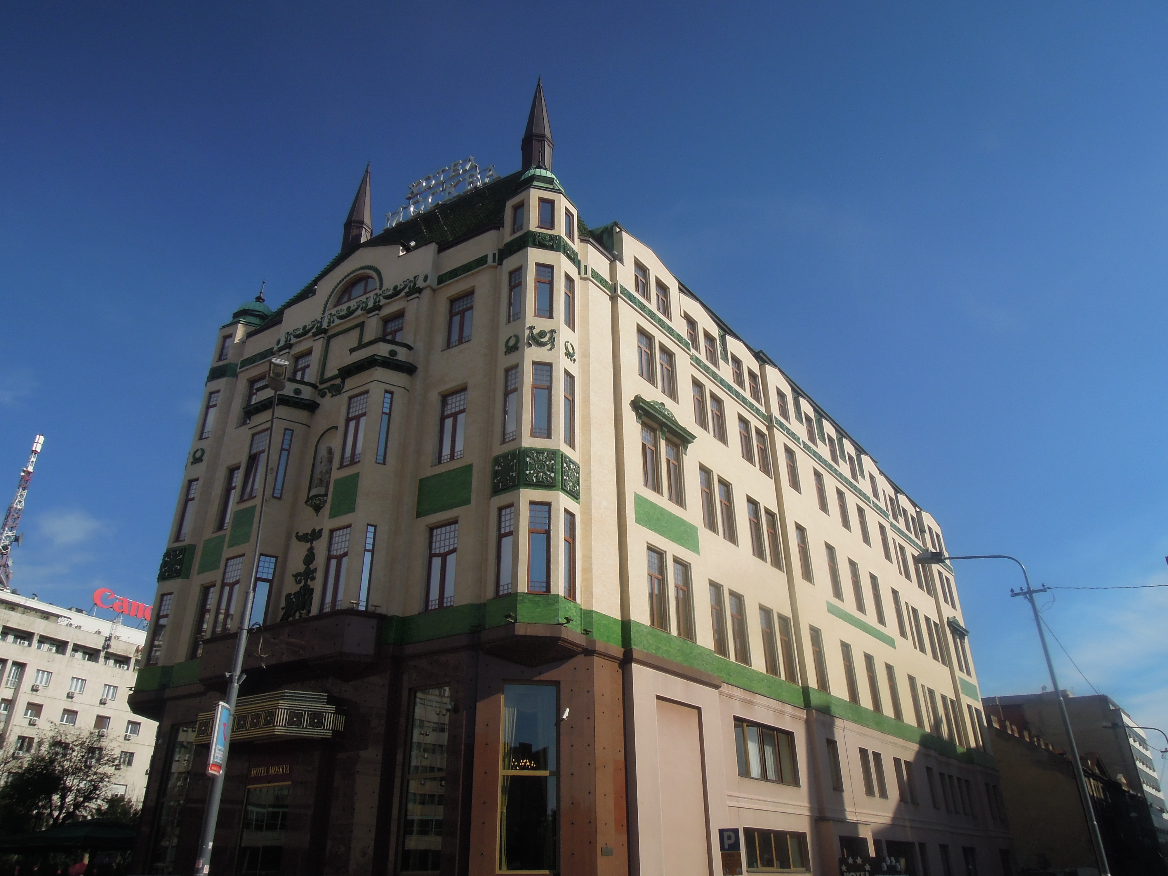 Zgrada hotela Moskva u Beogradu.